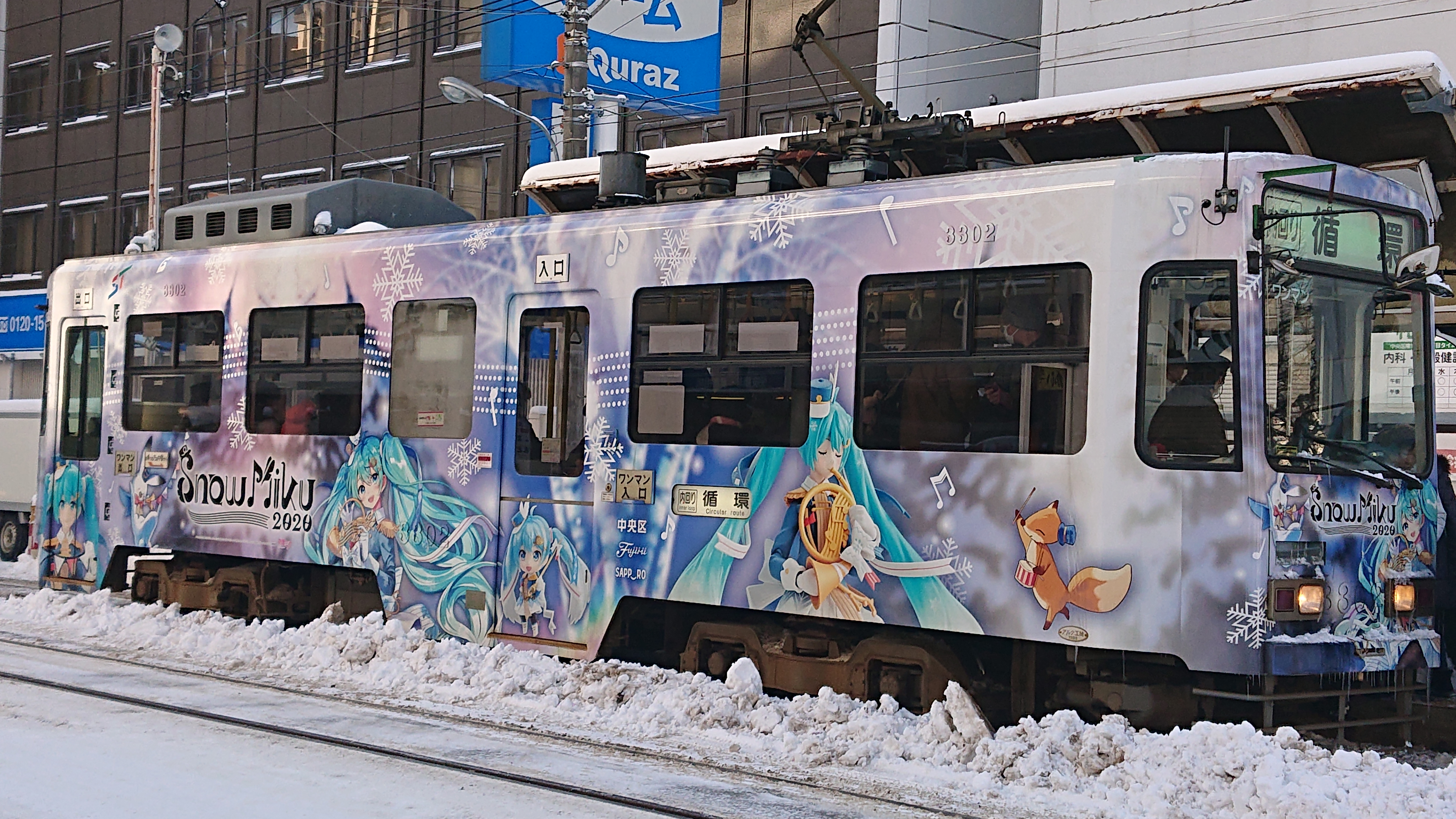 雪ミク電車2020。中央区役所前停留所に停車中